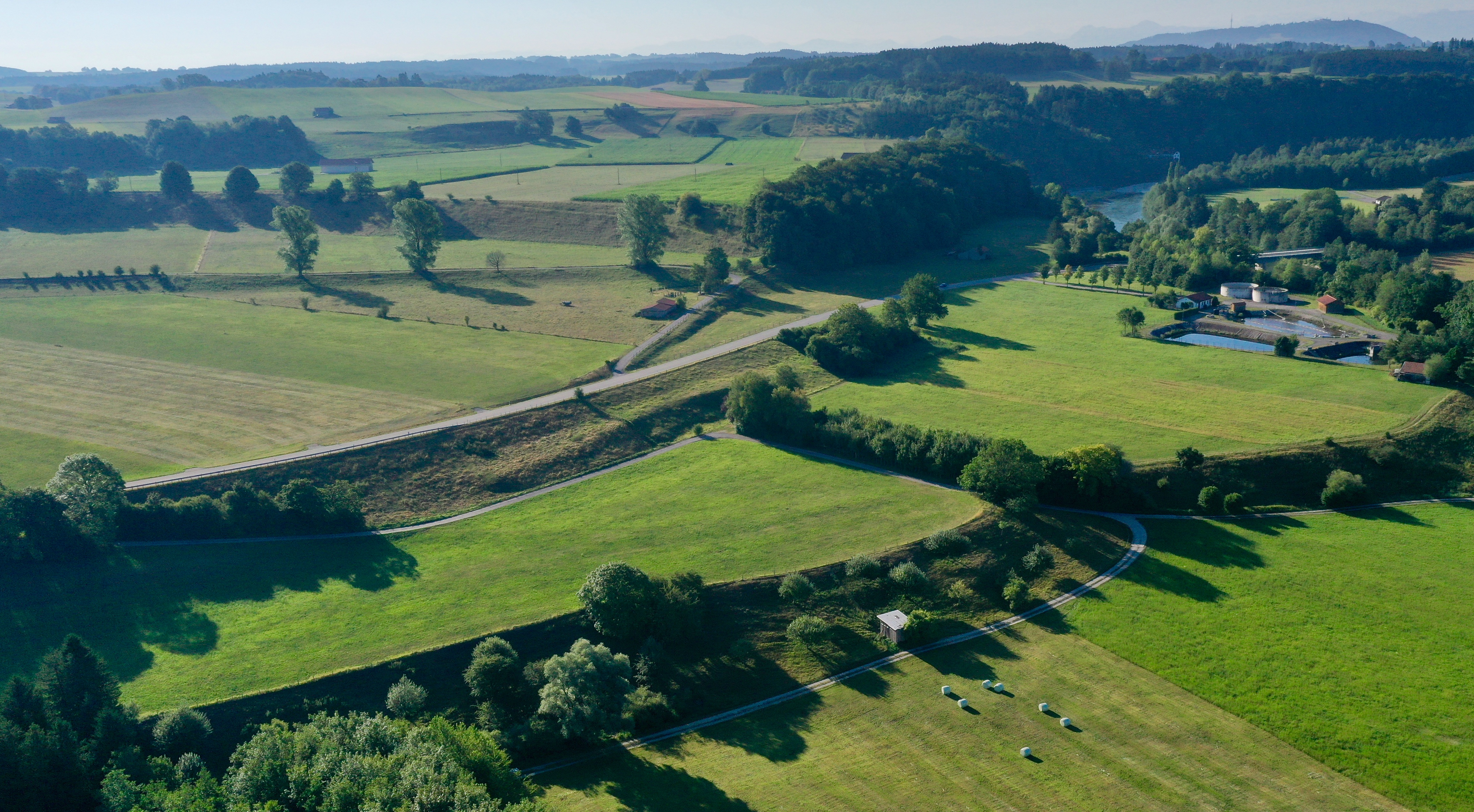 Luftbild der Terrassentreppe am Lech südlich von Apfeldorf.